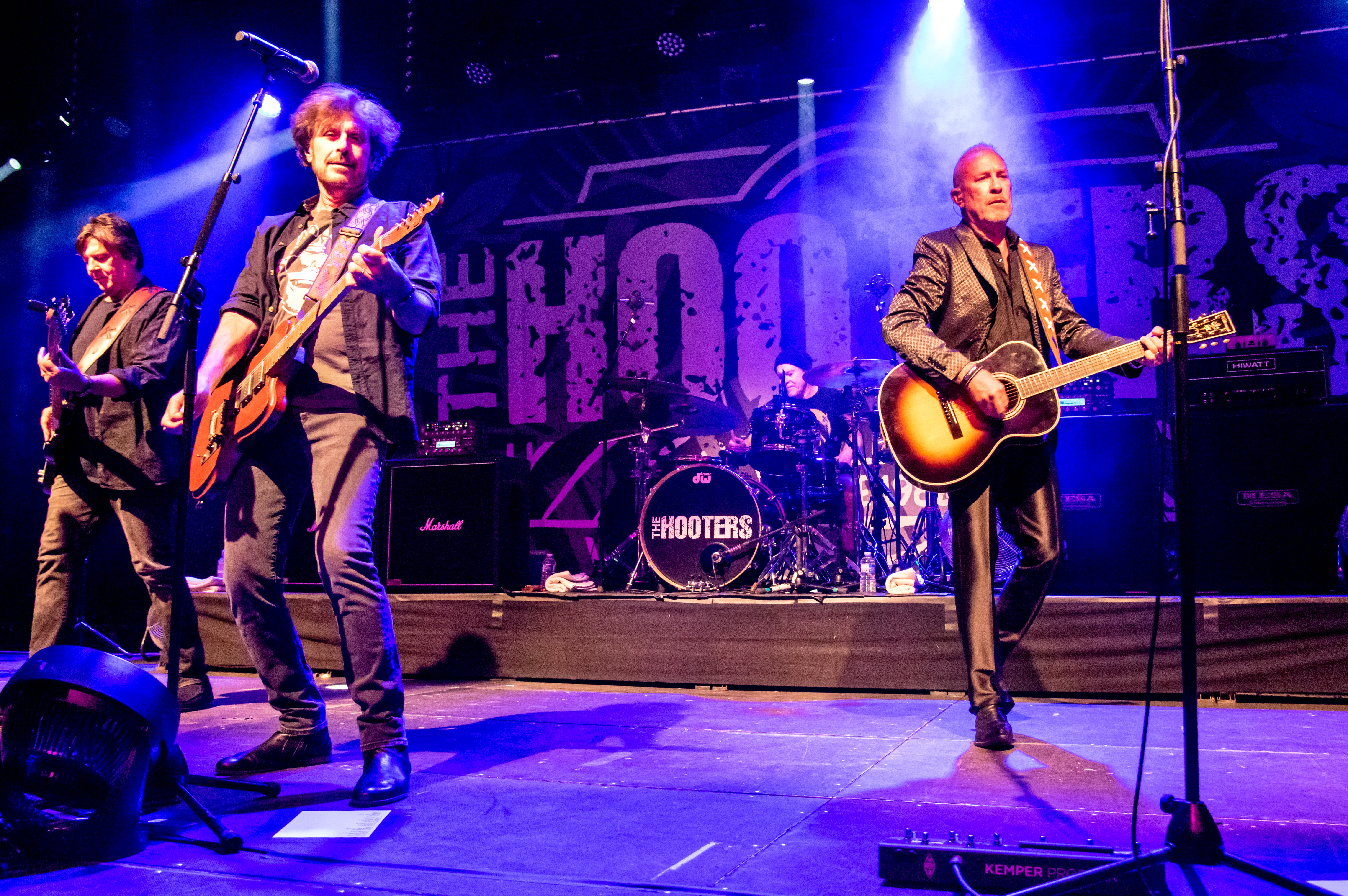 Bilder vom Zelt Musik Festival 2018 in Freiburg im Breisgau Auftritt The Hooters am 26. Juli 2018 im Zirkuszelt